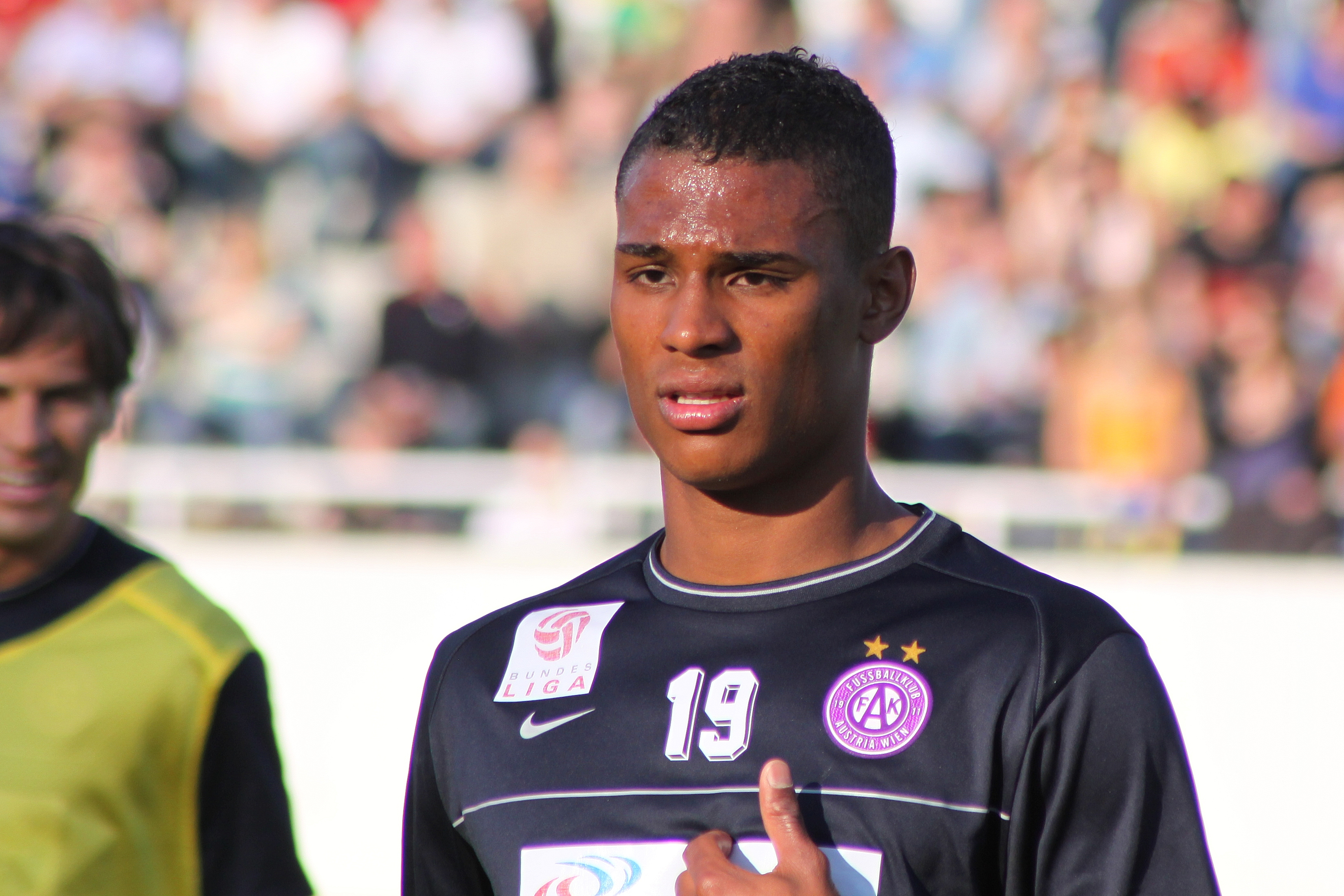 Rubin Rafael Okotie - FK Austria Wien (quer)